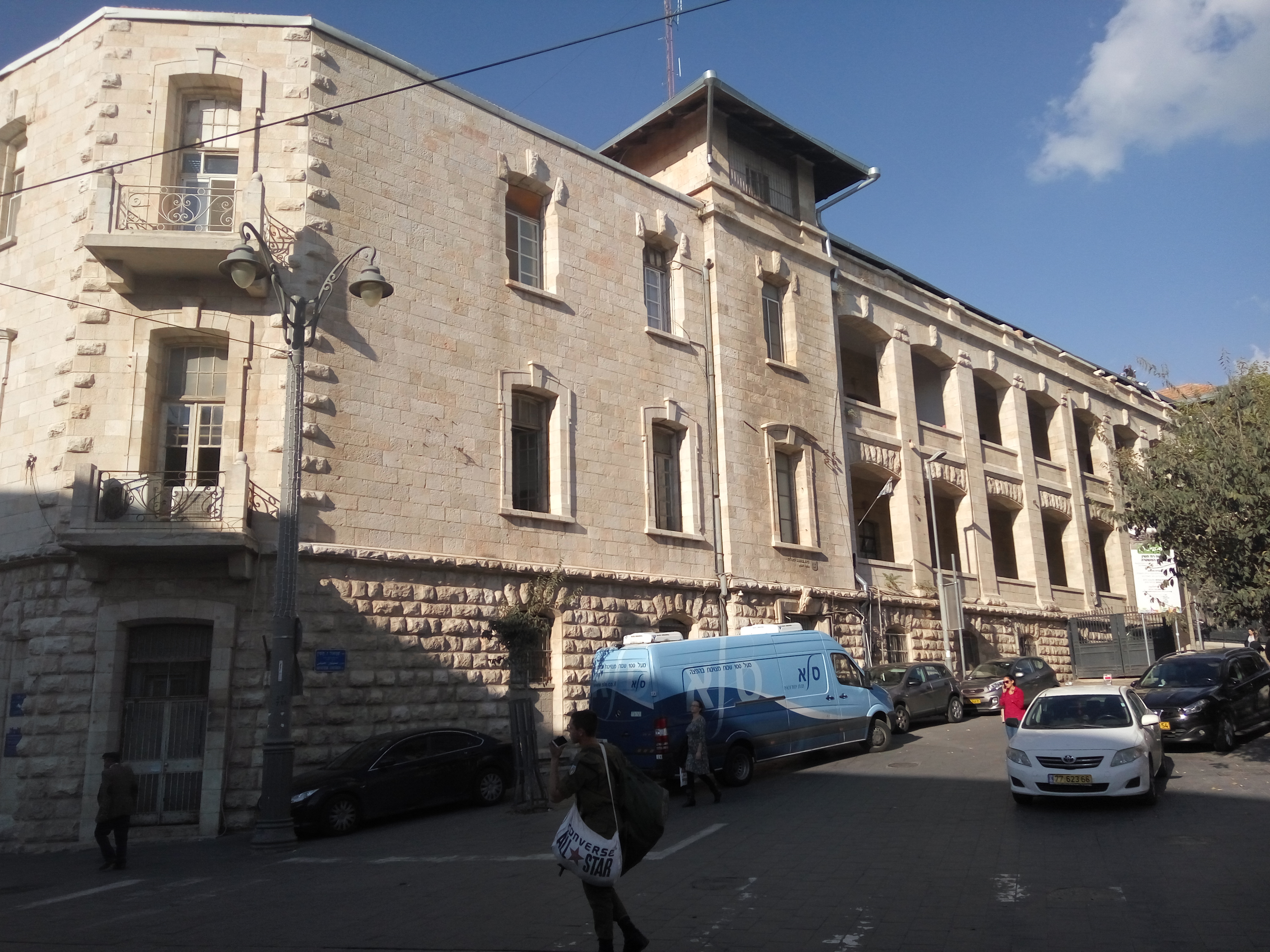 הבניין שוכן במגרש הרוסים בירושלים